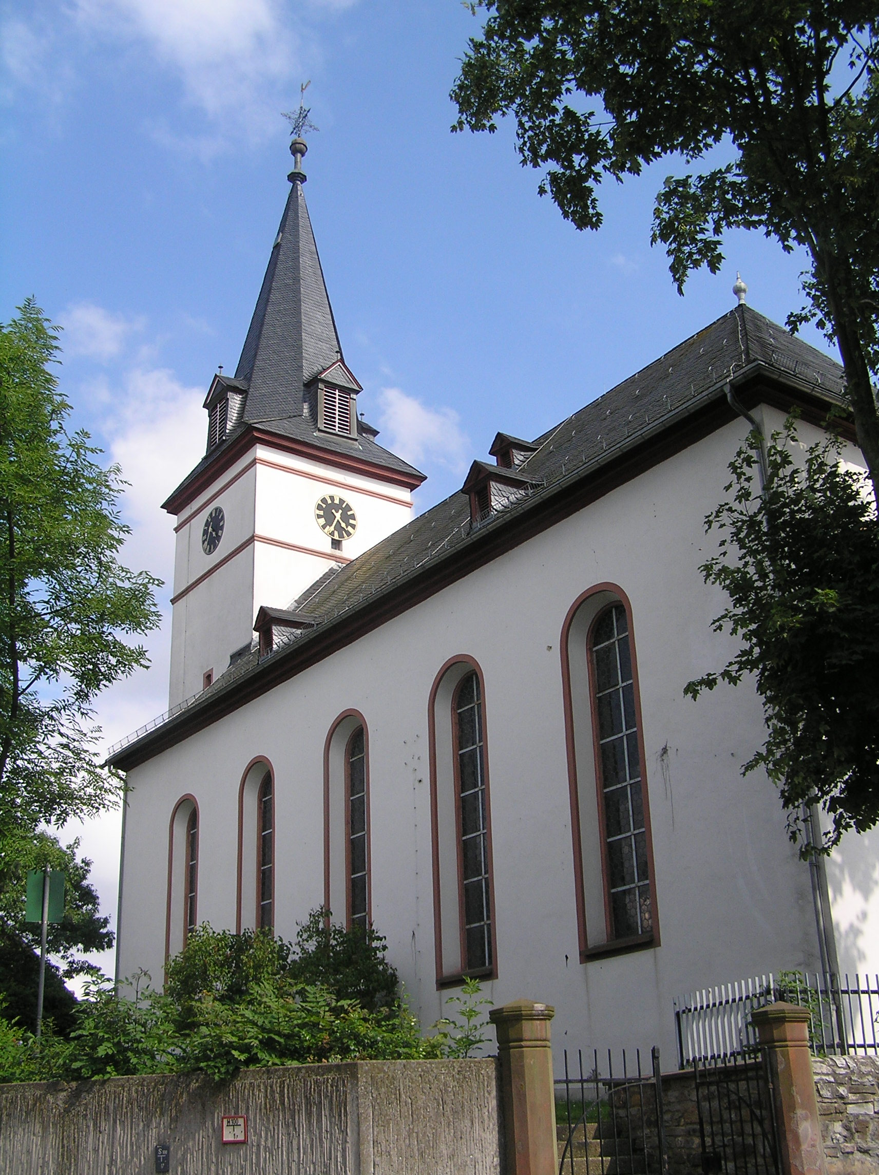 Wehrheim, evangelische Barockkirche, erbaut 1780-1782 anstelle einer älteren mittelalterlichen Kirche